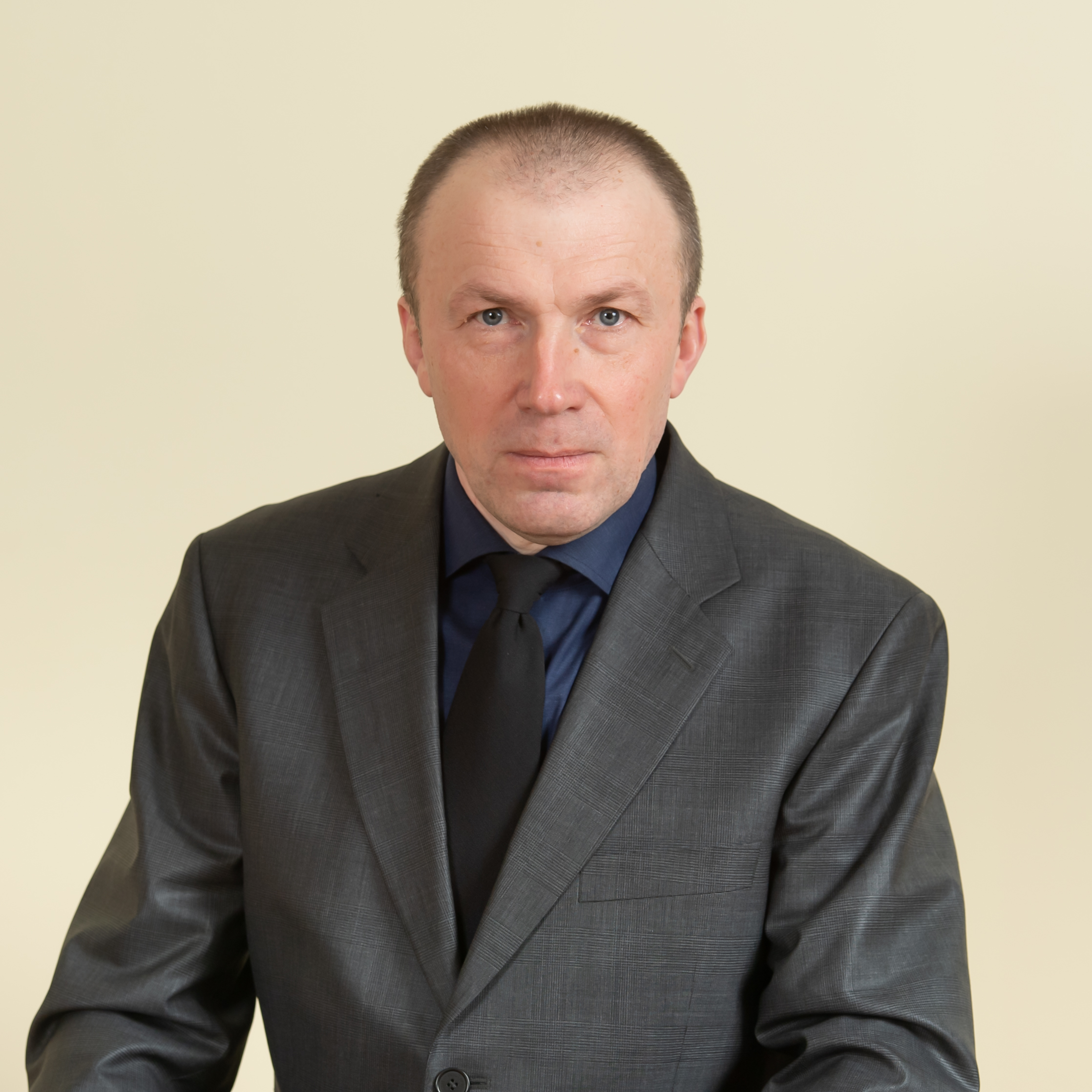 Leo Kunnas